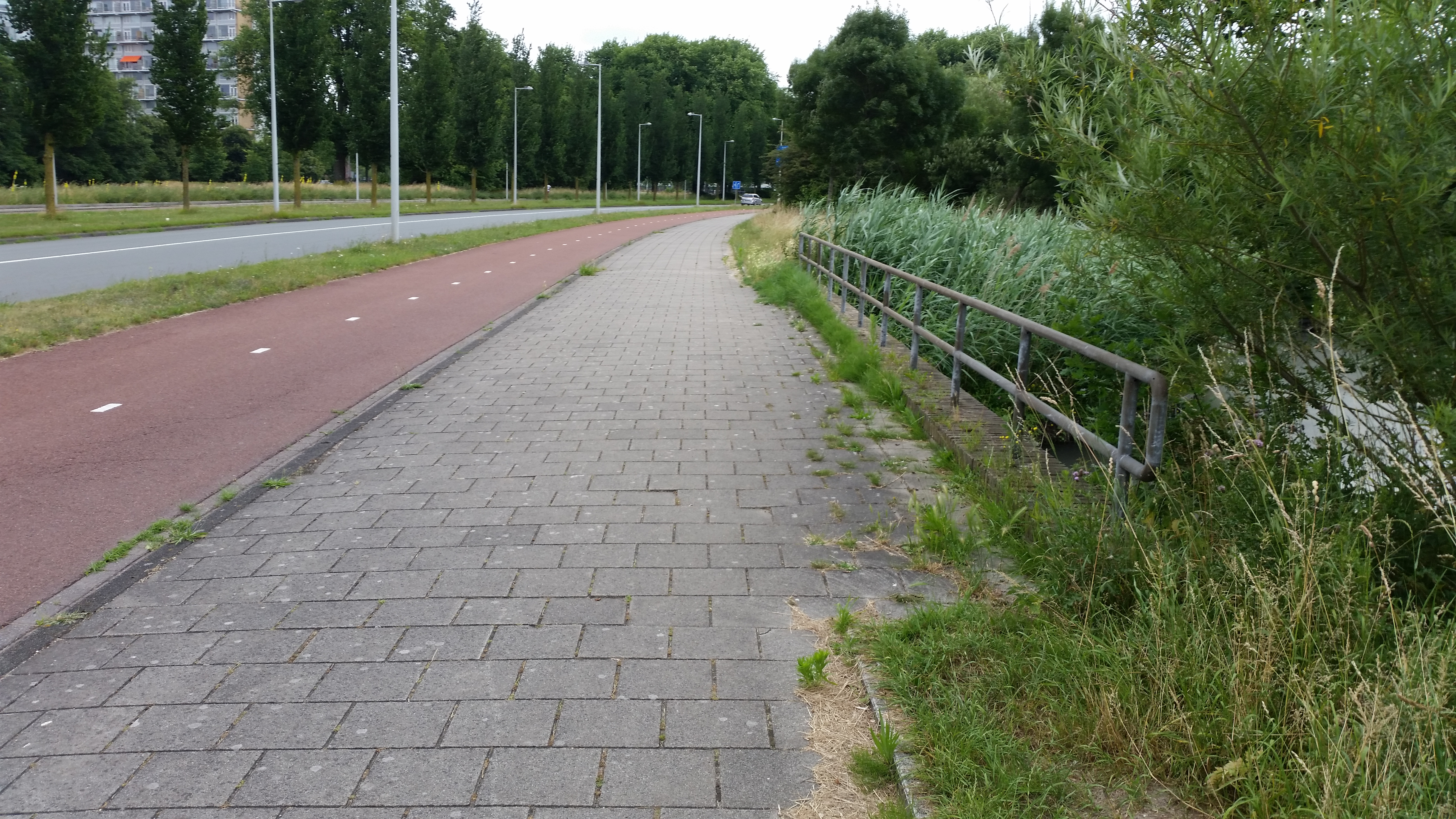 De Duiker Poldergmaal Plesmanlaan is gelegen in de Plesmanlaan, Amsterdam-West. De brug ligt over een duiker tussen de Slotervaart en het Poldergemaal Plesmanlaan. Het heeft een bordje 710, maar dat is abusievelijk geplaatst